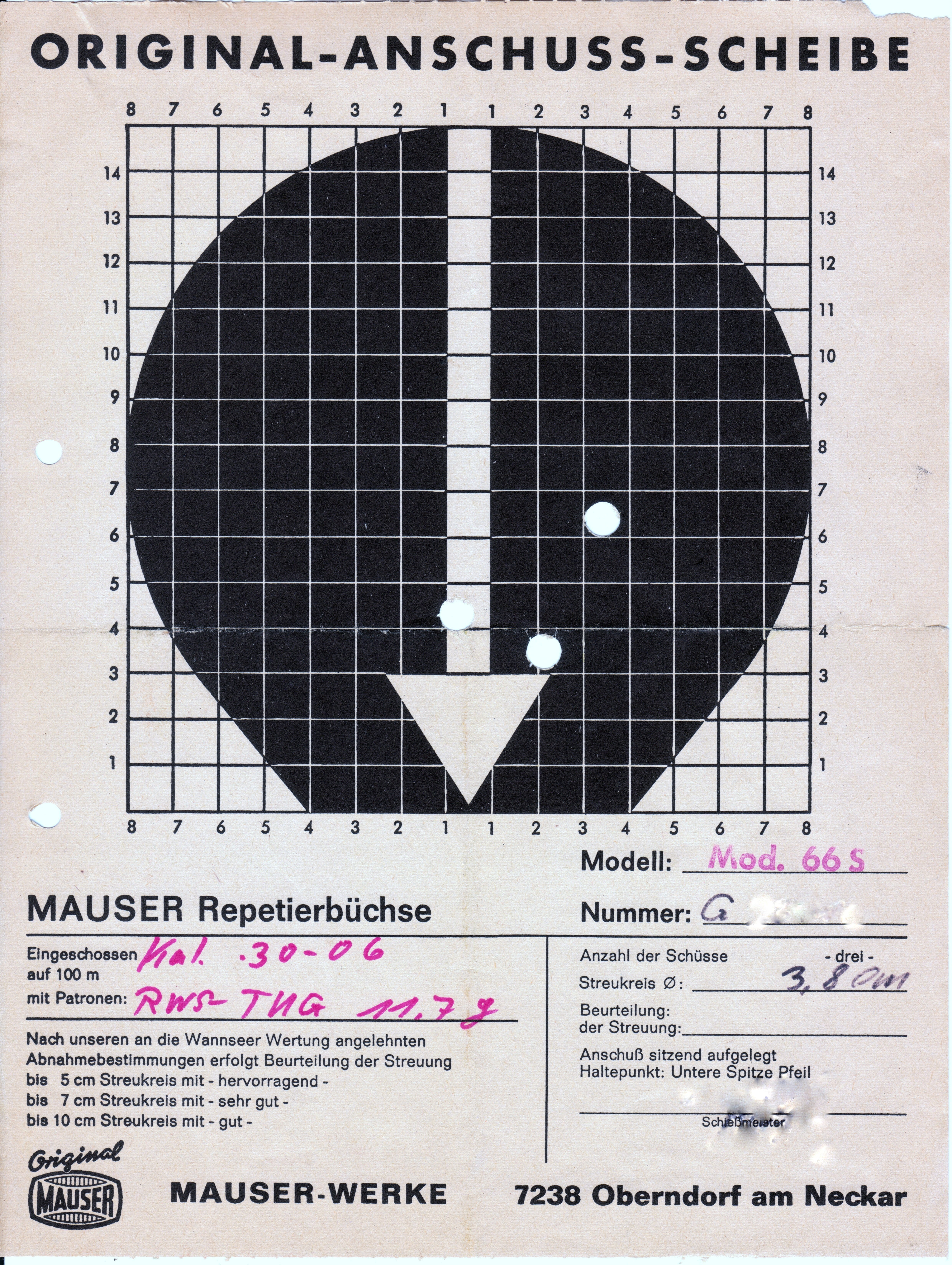 Anschußscheibe, beschossen